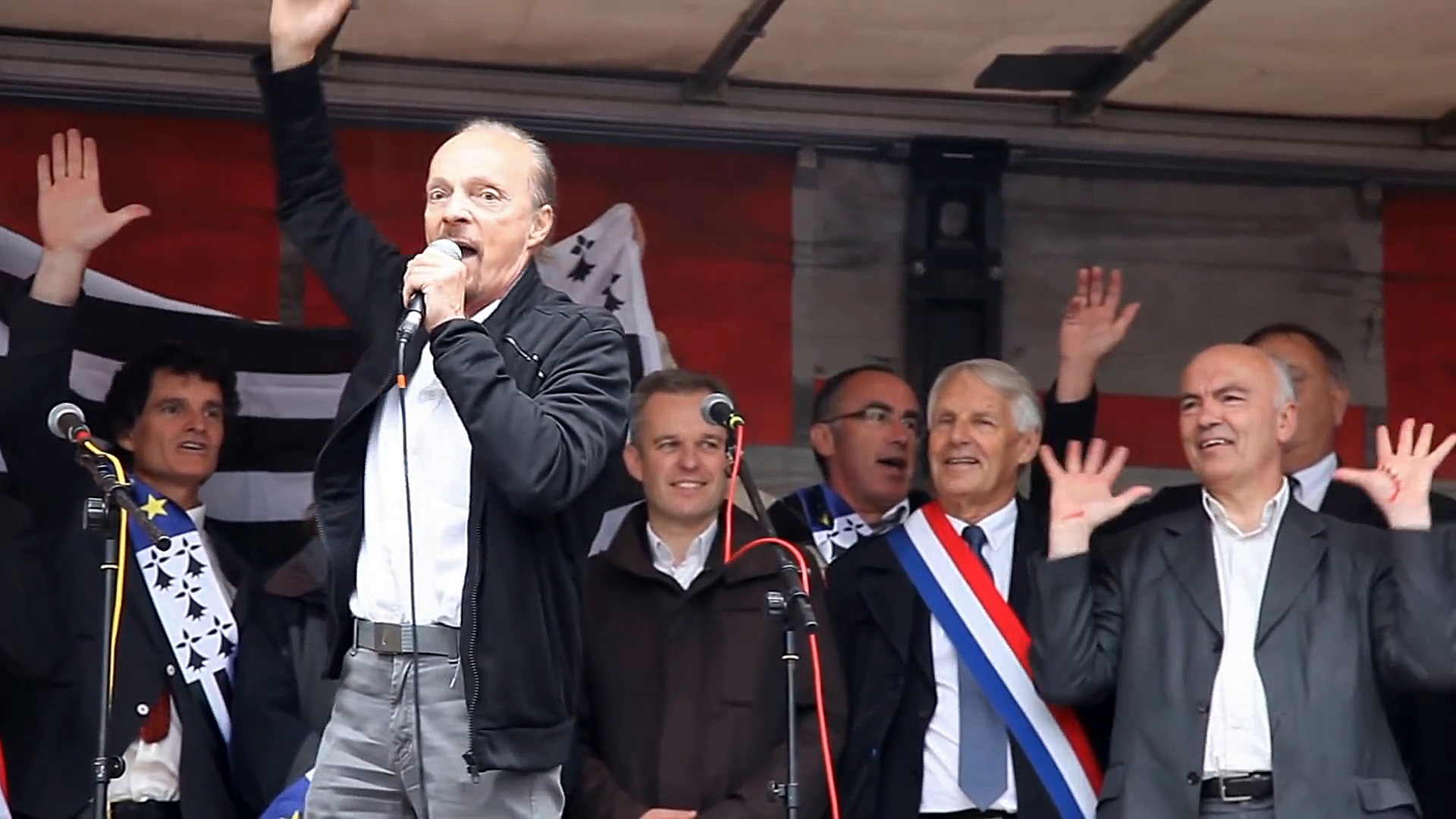 Alan Stivell chantant "Hep'Naoned, Breizh ebet !" lors de la manifestation pour la Réunification de la Bretagne avec les élus bretons le samedi 28 juin 2014 à Nantes.